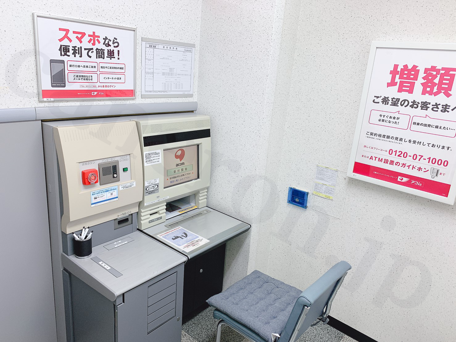 大手消費者金融アコムの店舗内の写真。2020年4月24日撮影。caneron.jpが撮影